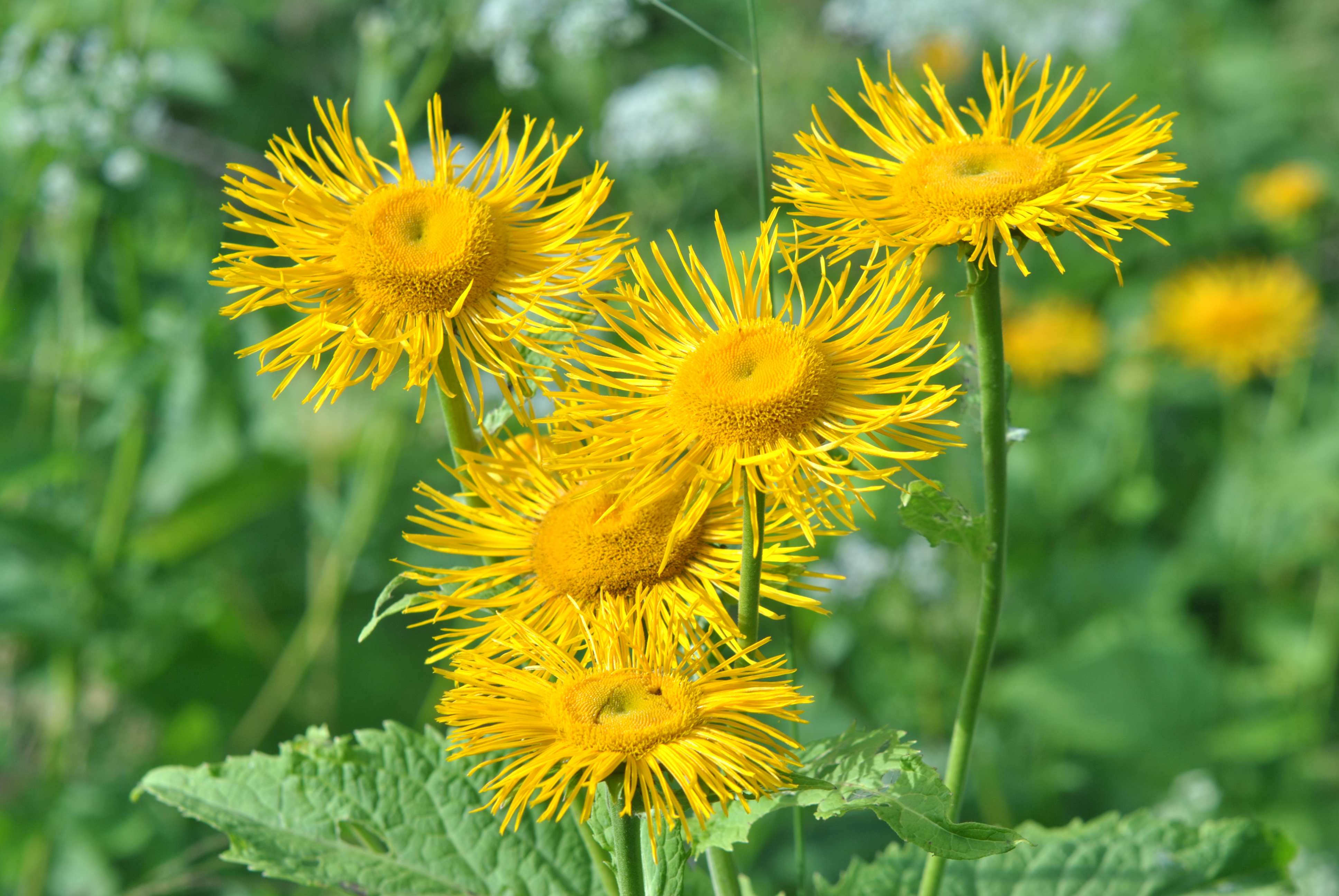 Крем'яник гарний (Телекия прекрасная) Telekia speciosa/ сфотографовано в с.Богдан (Рахівський р-н, Закарпатська обл, Україна)